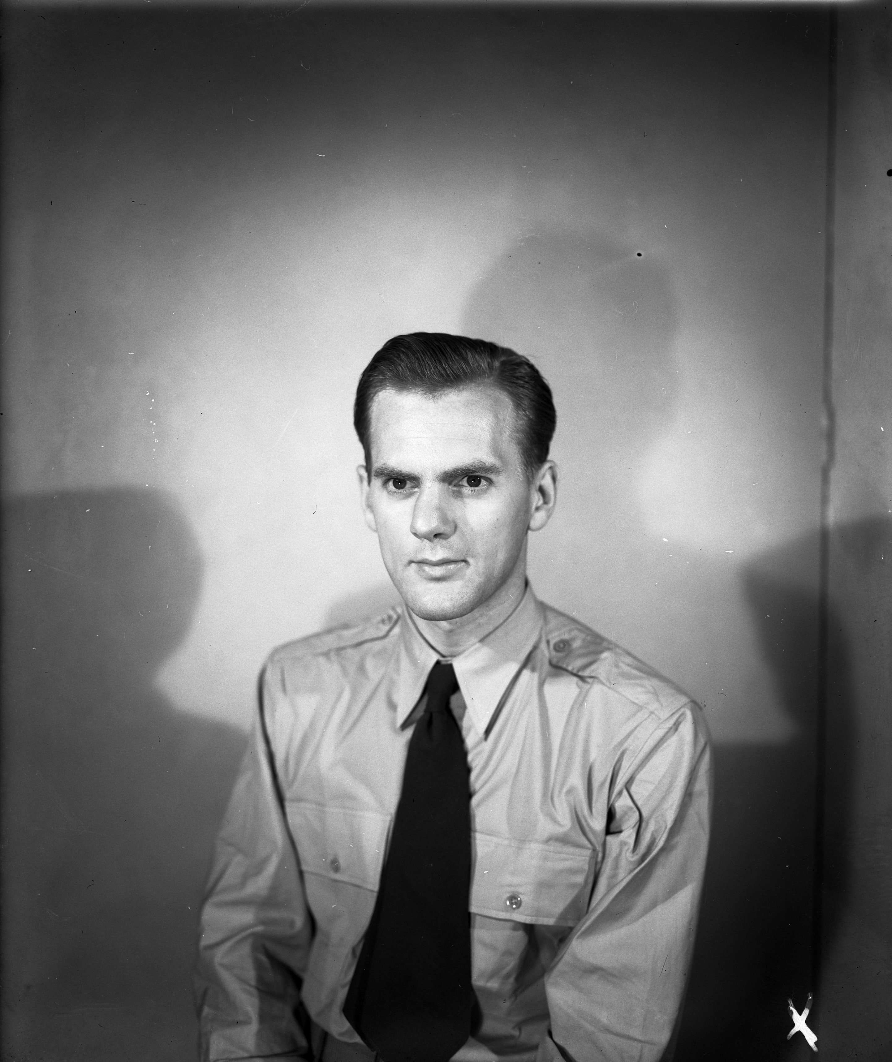 J.H. Fernhout ("John Ferno"), werkzaam voor The Netherlands Information Bureau in New York (1942-1944)